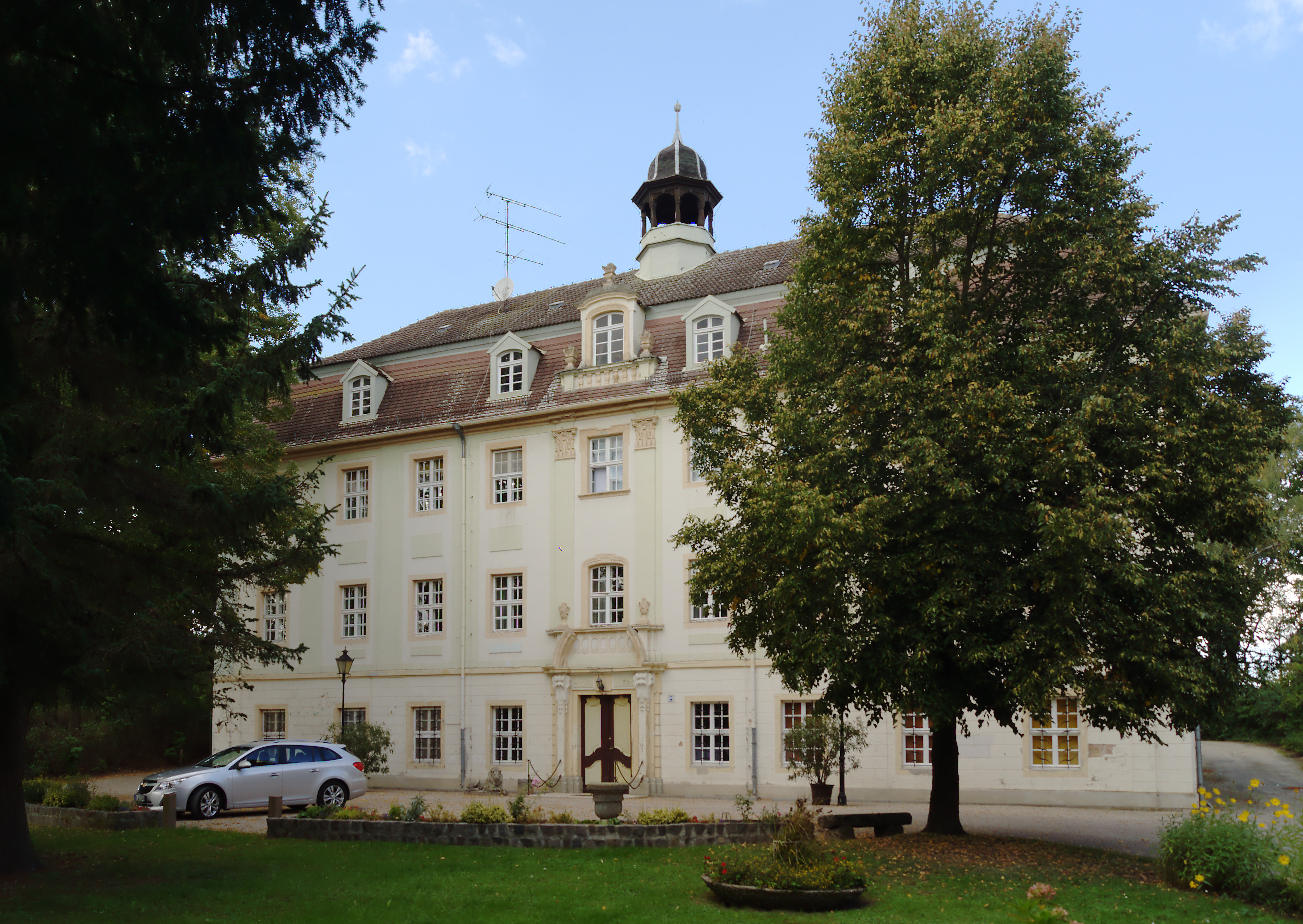 kastelo de Wartenburg